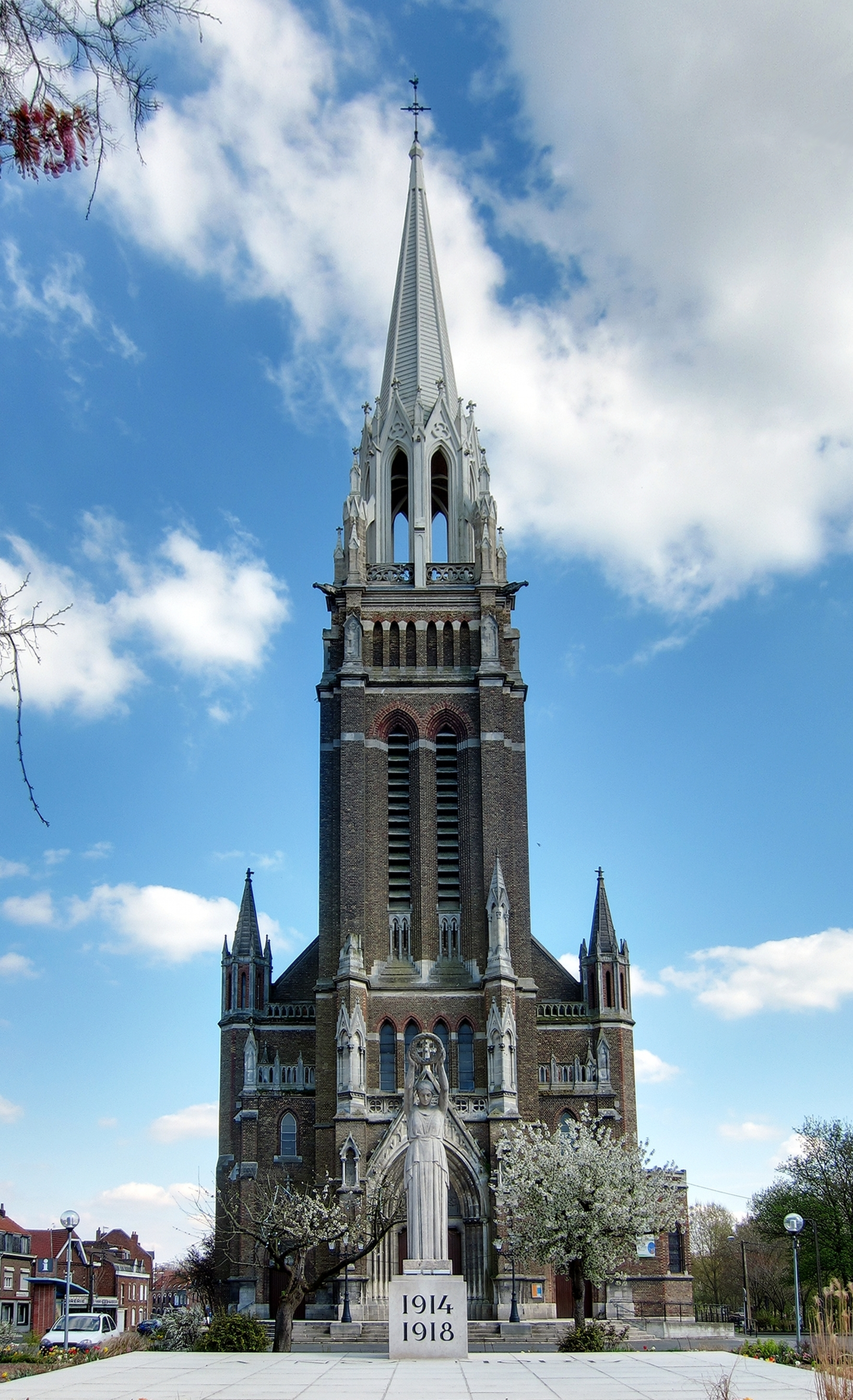 L'église d'Estaire, Nord, France.